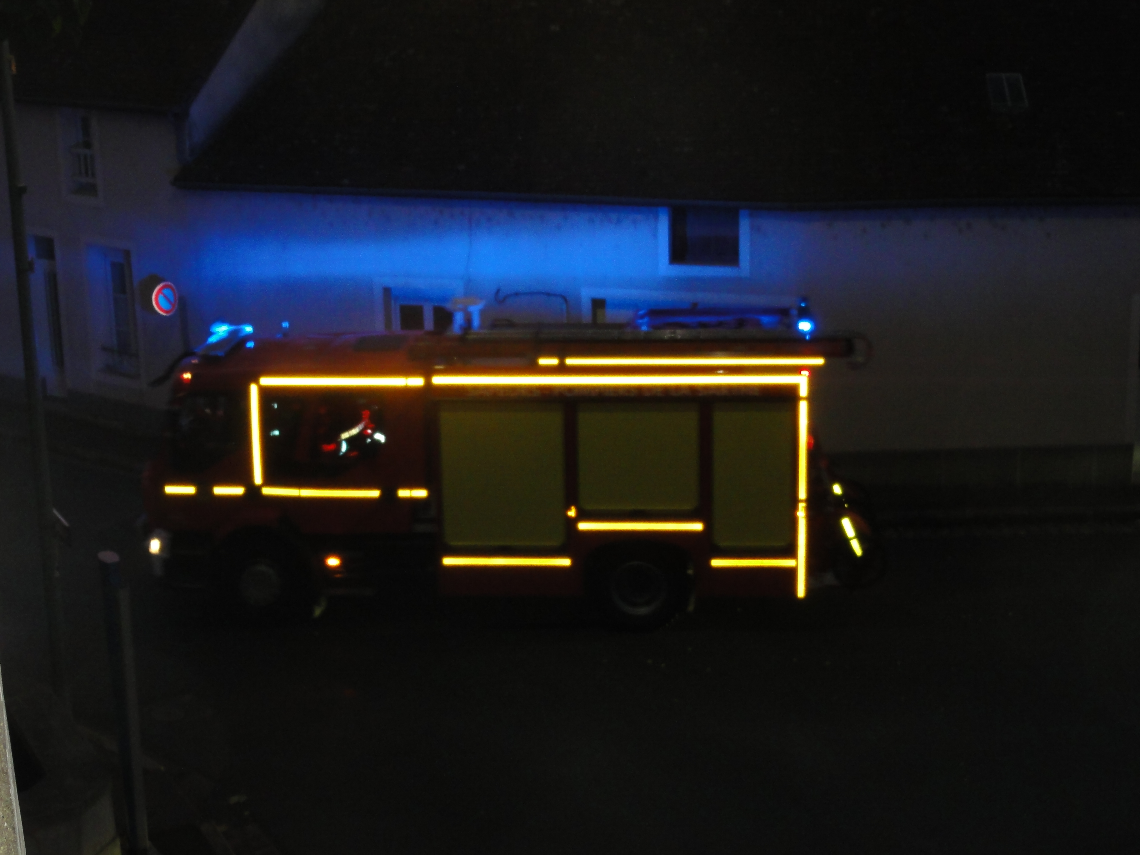 Beaumont-sur-Sarthe (Sarthe) Firefighting equipment, visibility by night